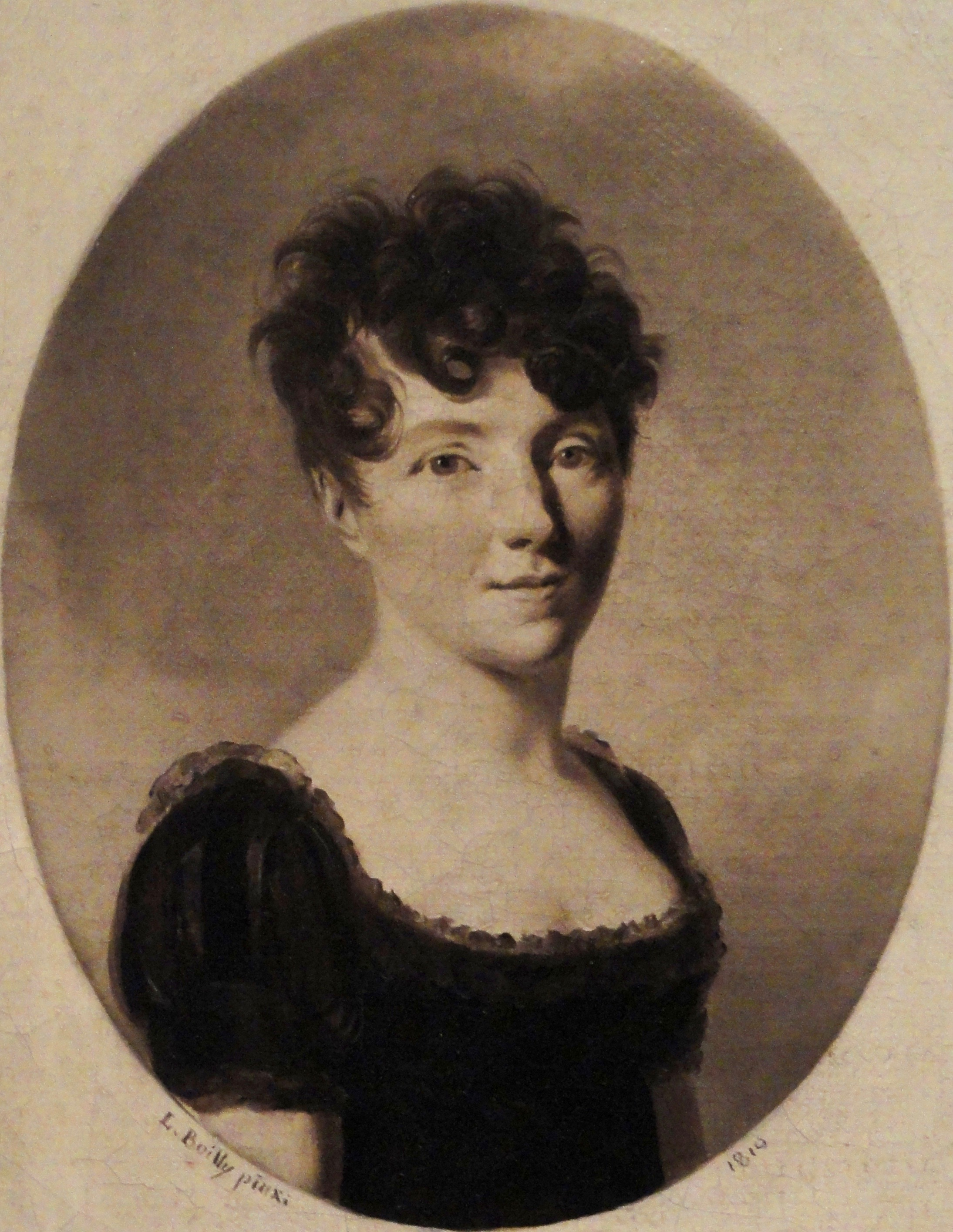 Louis-Leopold Boilly (1761–1845): Porträt der Schriftstellerin und Komponistin Sophie de Bawr (1773–1860). Öl auf Leinwand, 22 x 16 cm. Fogg Art Museum, Harvard University, Cambridge, Massachusetts.